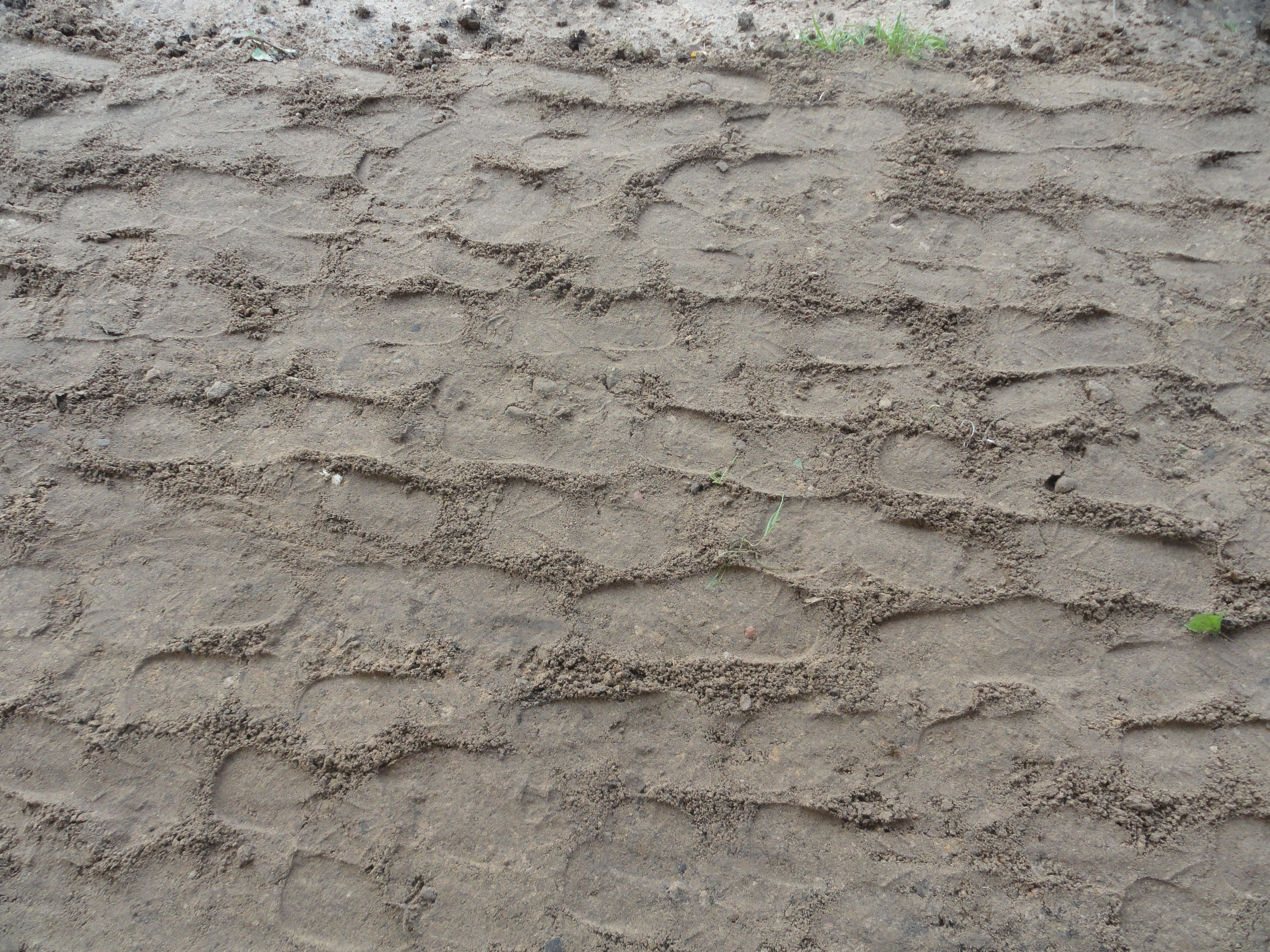 Следы человека